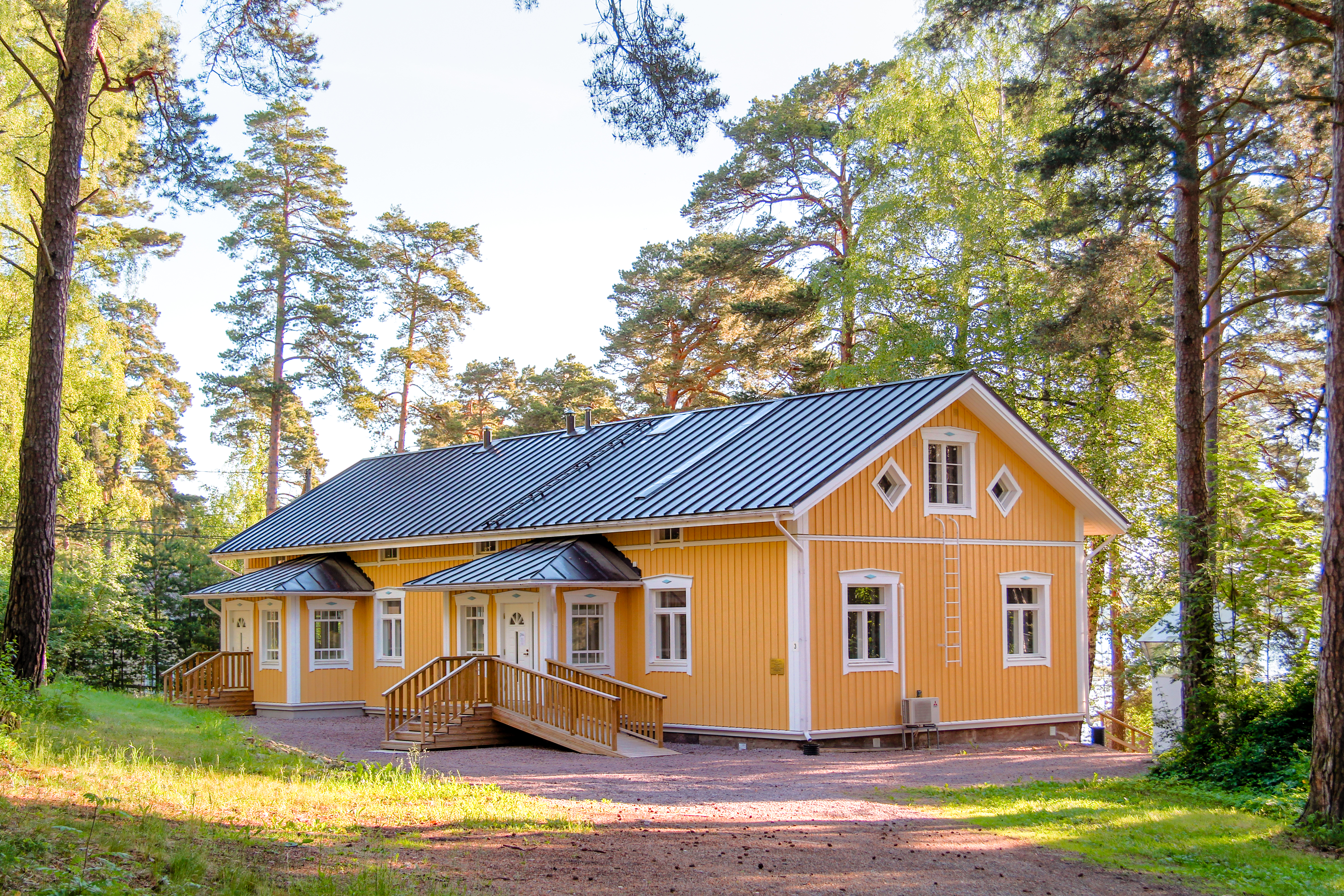 Utställningsutrymme: Sjöfartshuset i Nagu öppnade sommaren 2010. Utställningar: Nagubor i skärgårdsflottan under Gustav IIIs krig och Broar i Nagu.